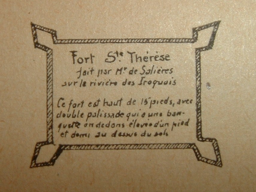 Plan du fort Sainte-Thérèse dressé pour la campagne du Régiment de Carignan-Salières, en 1666